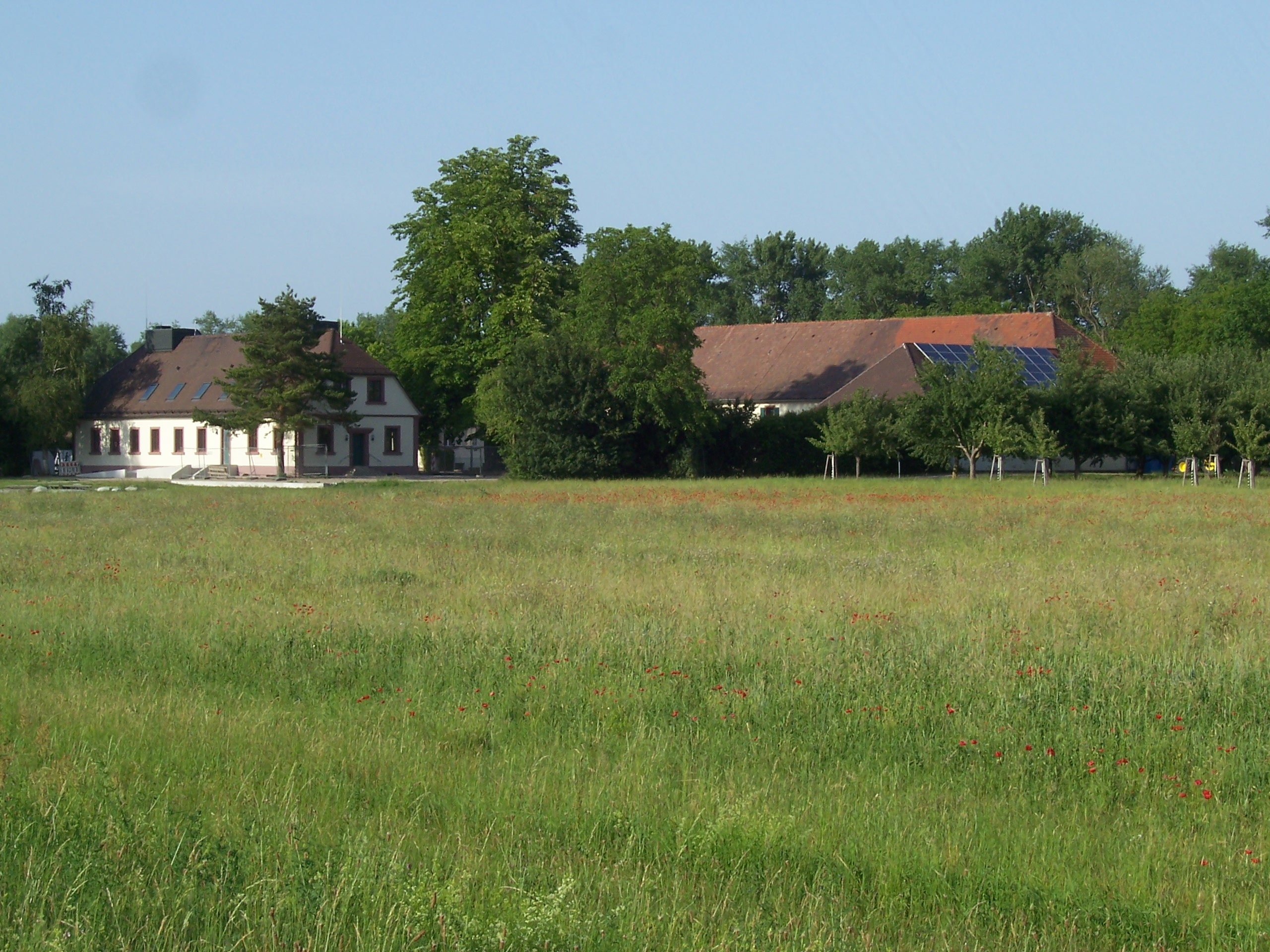 Hofgut Maxau im Landschaftsschutzgebiet Burgau, Karlsruhe, Baden-Württemberg, LSG Nr. 2.12.019